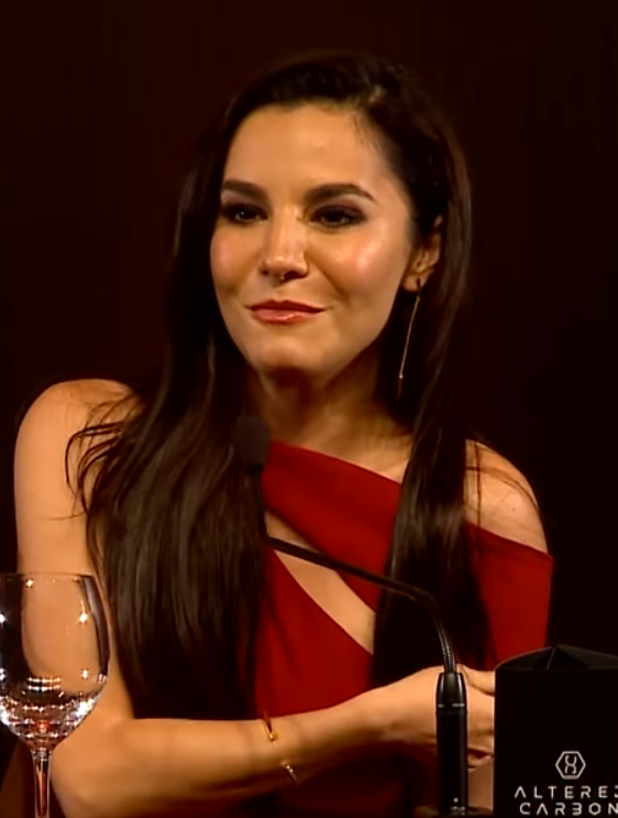 La inmortalidad a costa de la humanidad es la reflexión que hace la nueva serie de Netflix, "Altered carbon", con las actuaciones estelares de Joel Kinnaman y la mexicana Martha Higareda